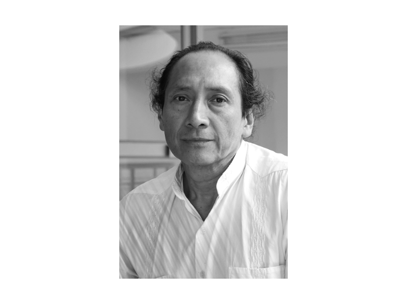 Foto del artista Rene Toapanta Rivera